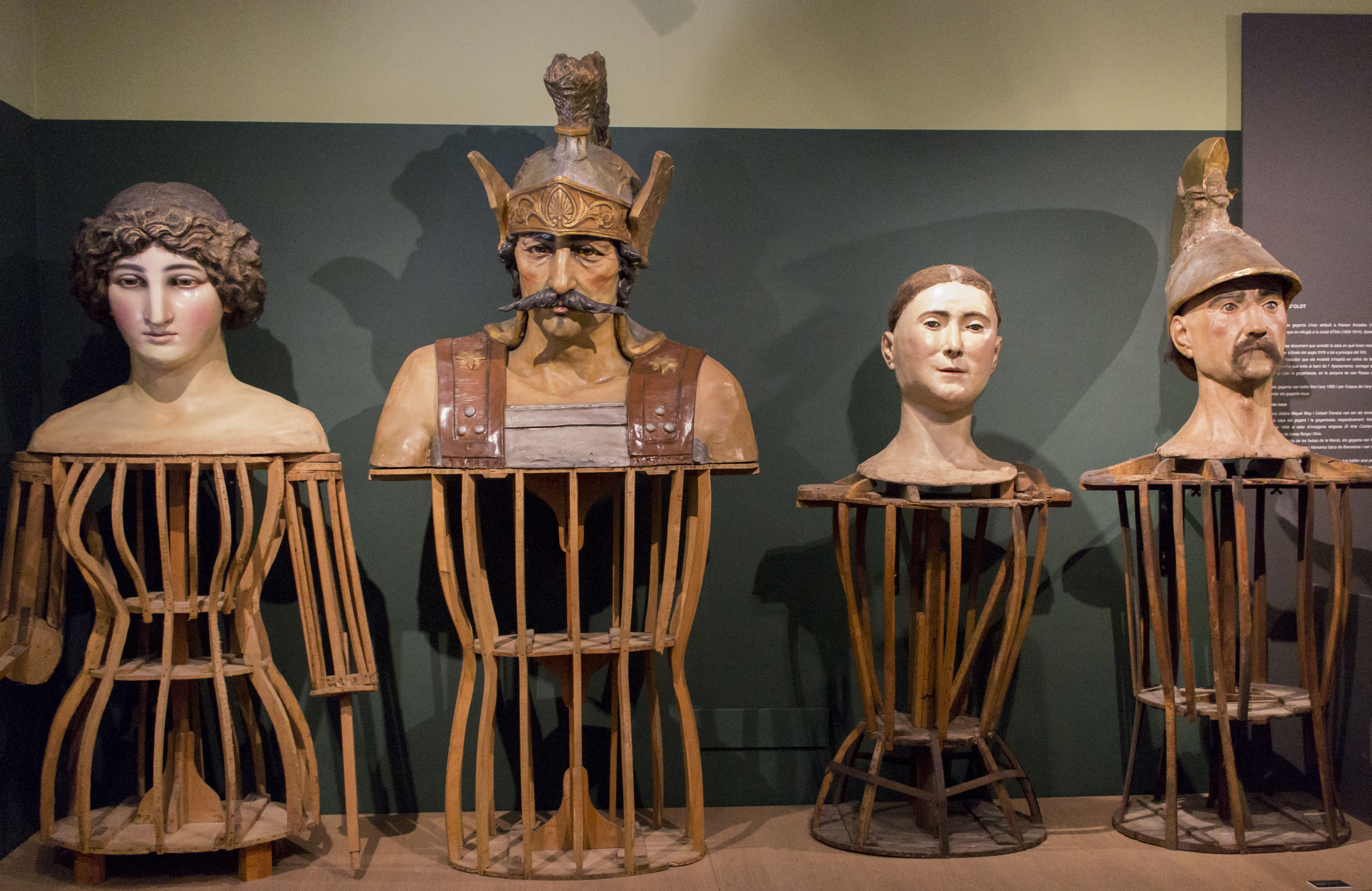 Els gegants nous (a l'esquerra) de 1888 el Gegant de Miquel Blay i la Gegantessa de Celestí Devesa i els gegants vells d'Olot (a la dreta) atribuïts a Ramon Amadeu i datats de principis del segle XIX. Una imatge de l'exposició permanent del Museu dels Sants d'Olot